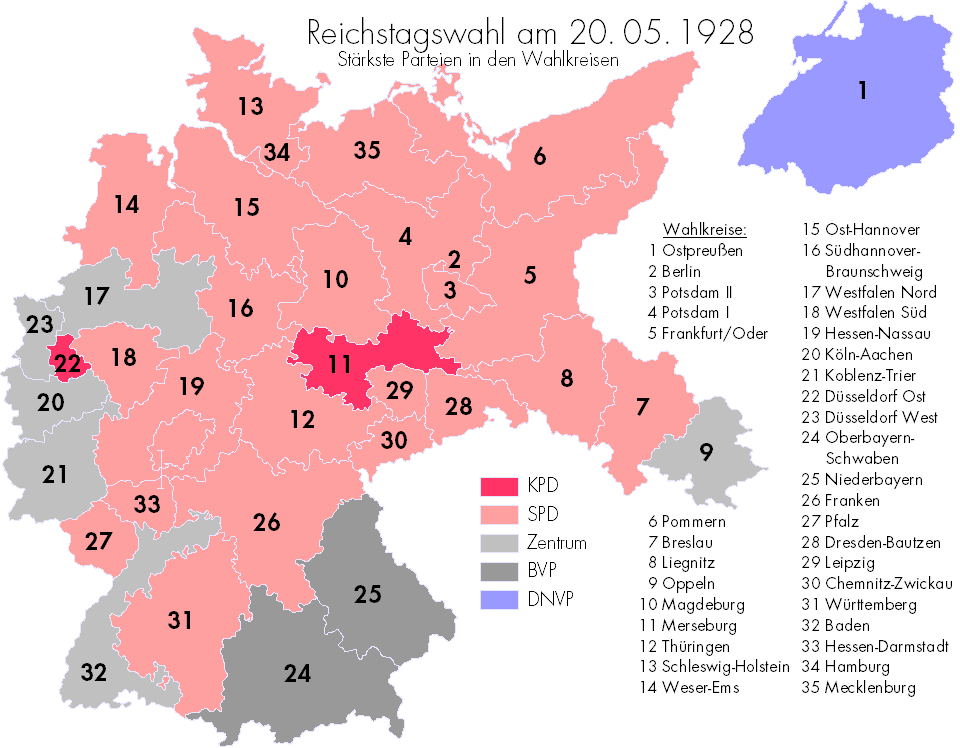 Ergebnisse der Reichstagswahl 1928 auf Wahlkreisebene. Datenquelle